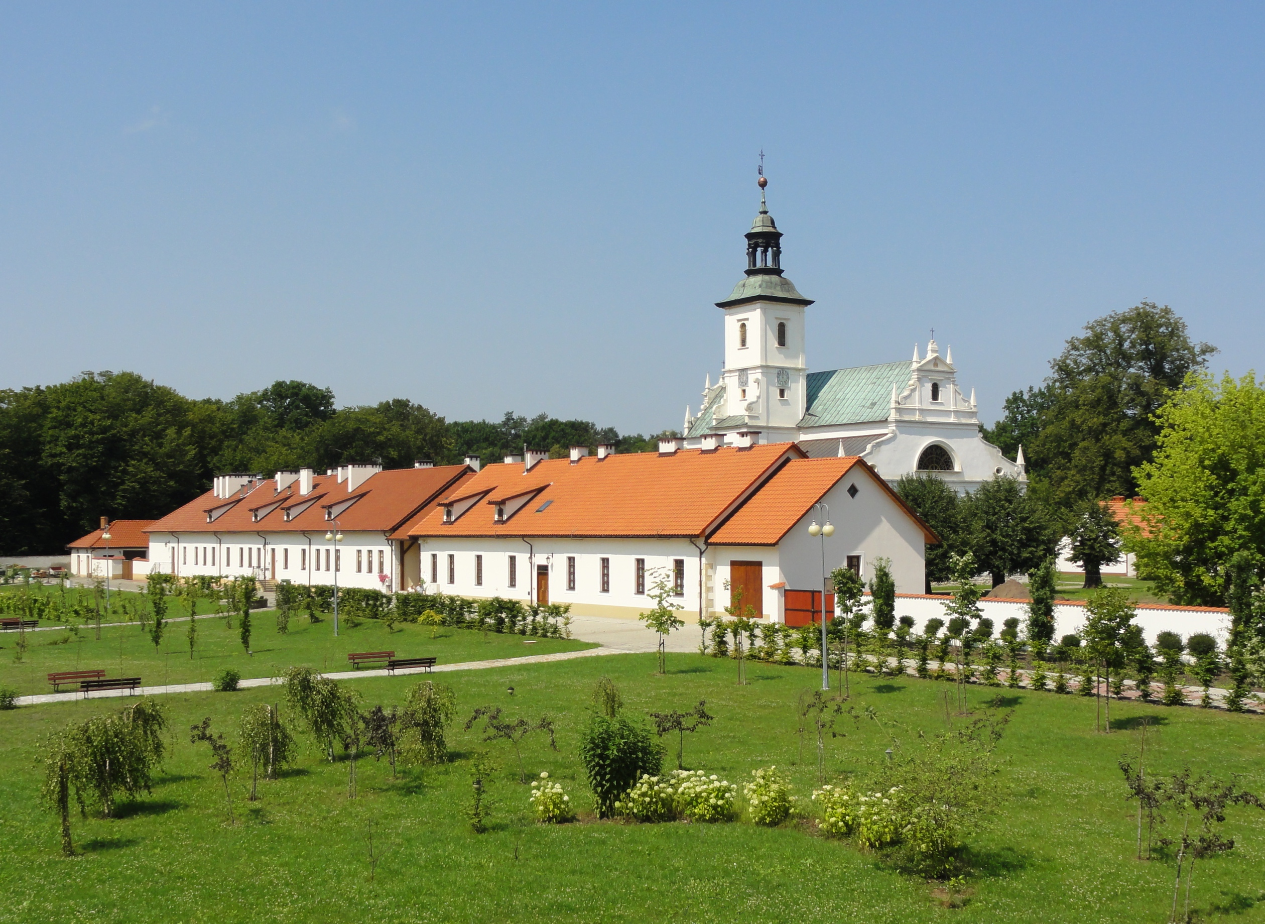 Rytwiany, Pustelnia Złotego Lasu, zabytkowy zespół klasztorny kamedułów, 1 poł. XVII w. Widok z ogrodów od strony południowo-wschodniej.